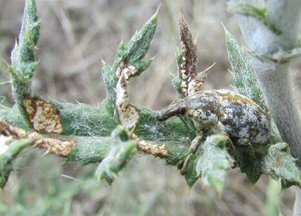 Жук-довгоносик Larinus vulpes на листку головатеня